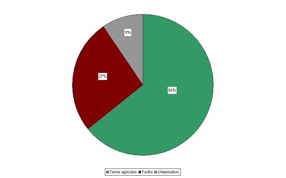 Utilisation du sol - Commune de Meikirch (Suisse) - 2009